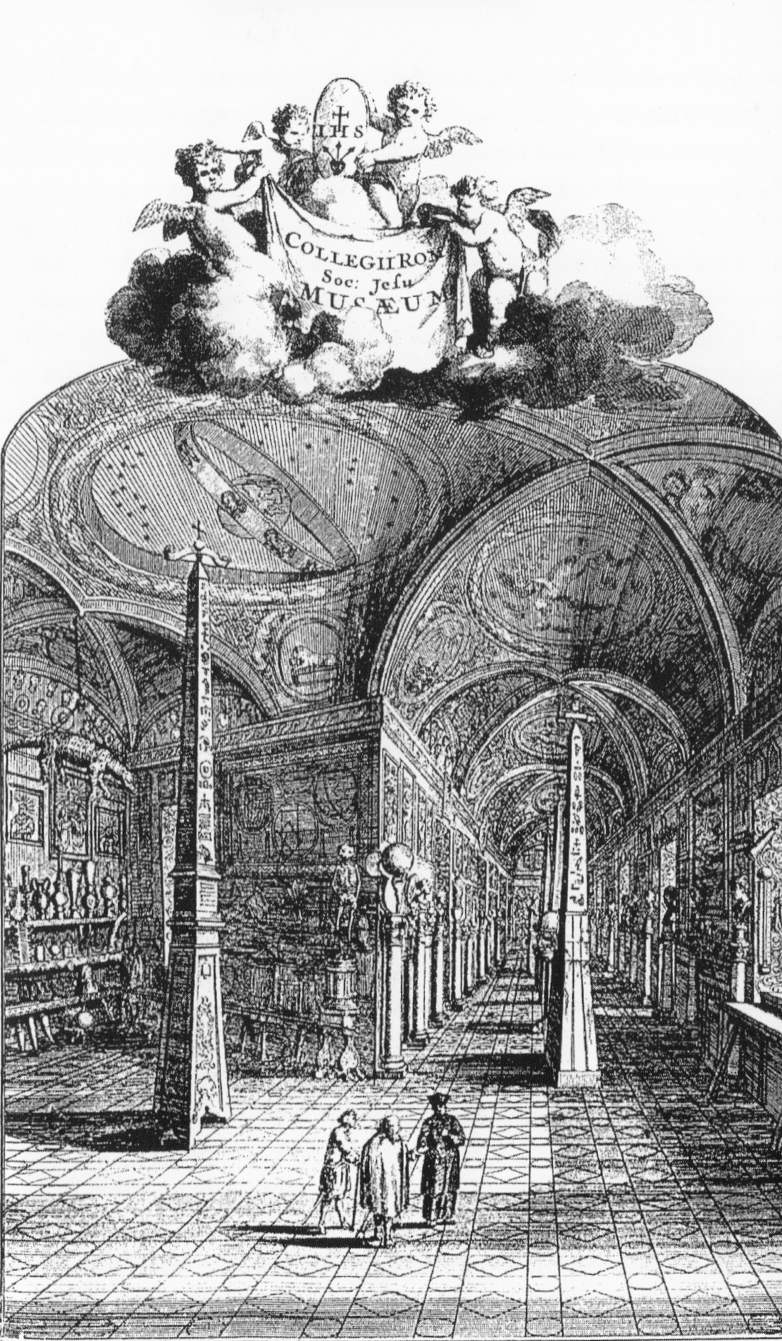 Das Kircher-Museum im Collegium Romanum. Abb. in "Turris Babel", Amsterdam, 1679.